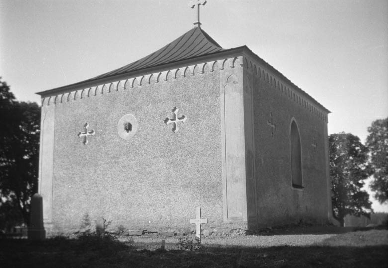 Gravkapellet från nordöst Motiv: Skärkind gravkapell (gamla kyrka) Kategori: (01) ExteriörerGravkapellet från nordöst.